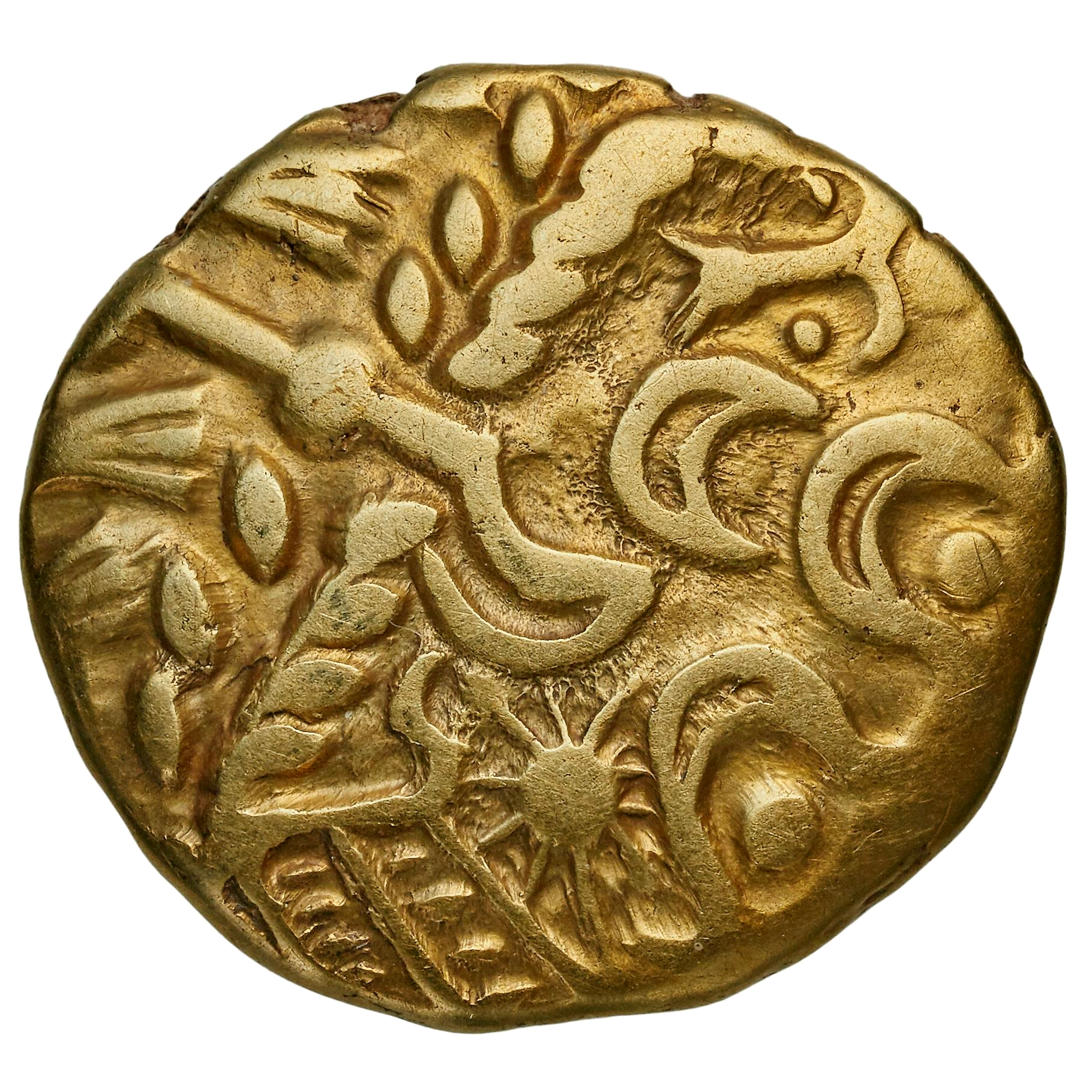 Statère des Suessions. Avers : Tête à droite stylisée et disloquée. Or, 5,9 gr. vers -200. Collection BnF : 1986.68 (GAU-11548)